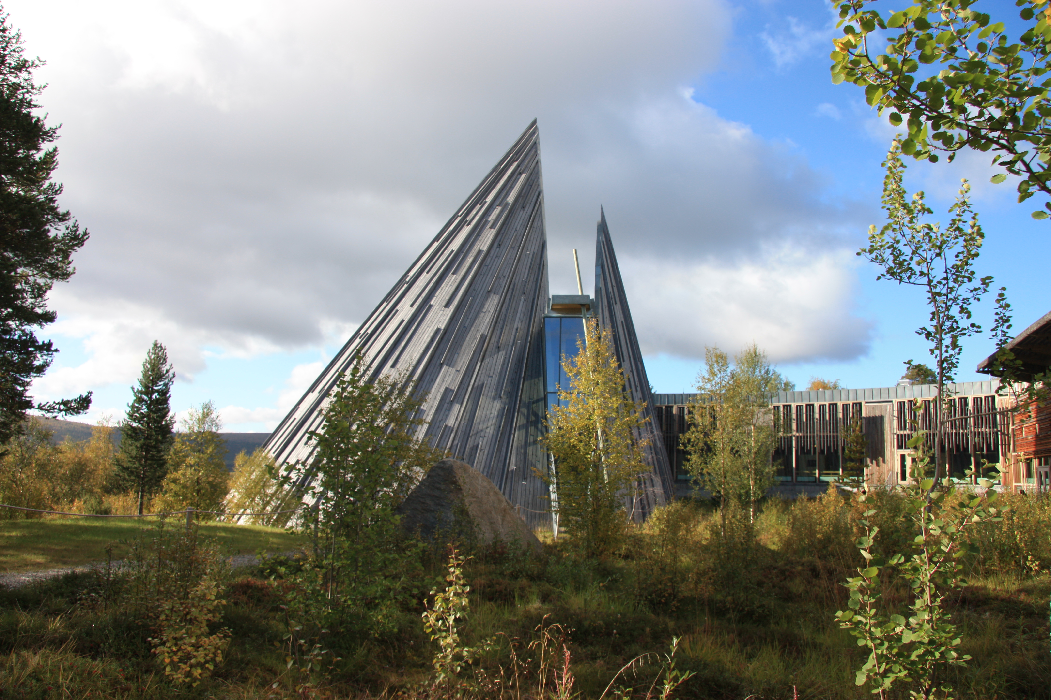 Foto: Sara Márja Magga/Sametinget. Sami Parliament of Norway